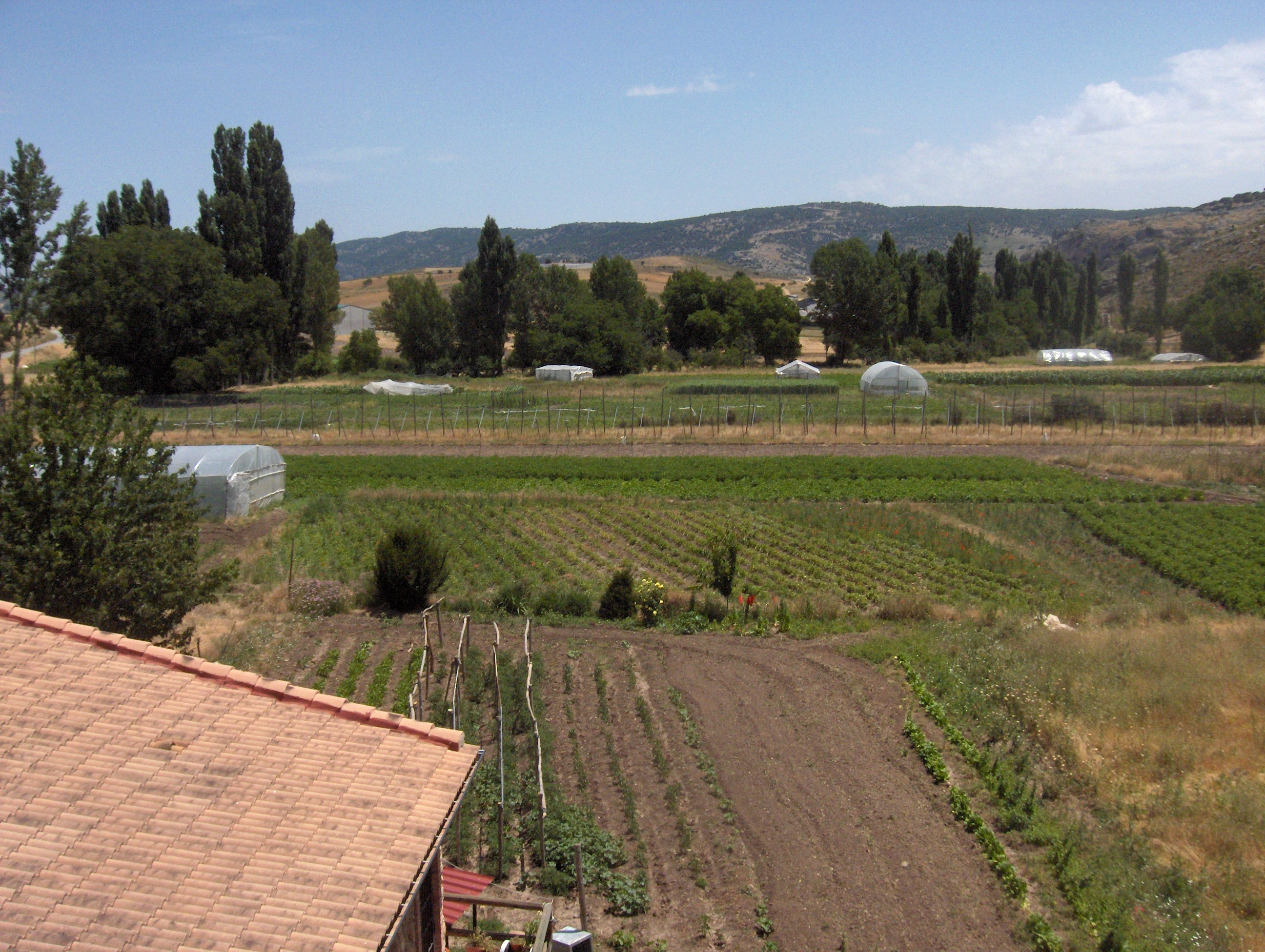 Campos cultivados junto a La Matea, Jaén.